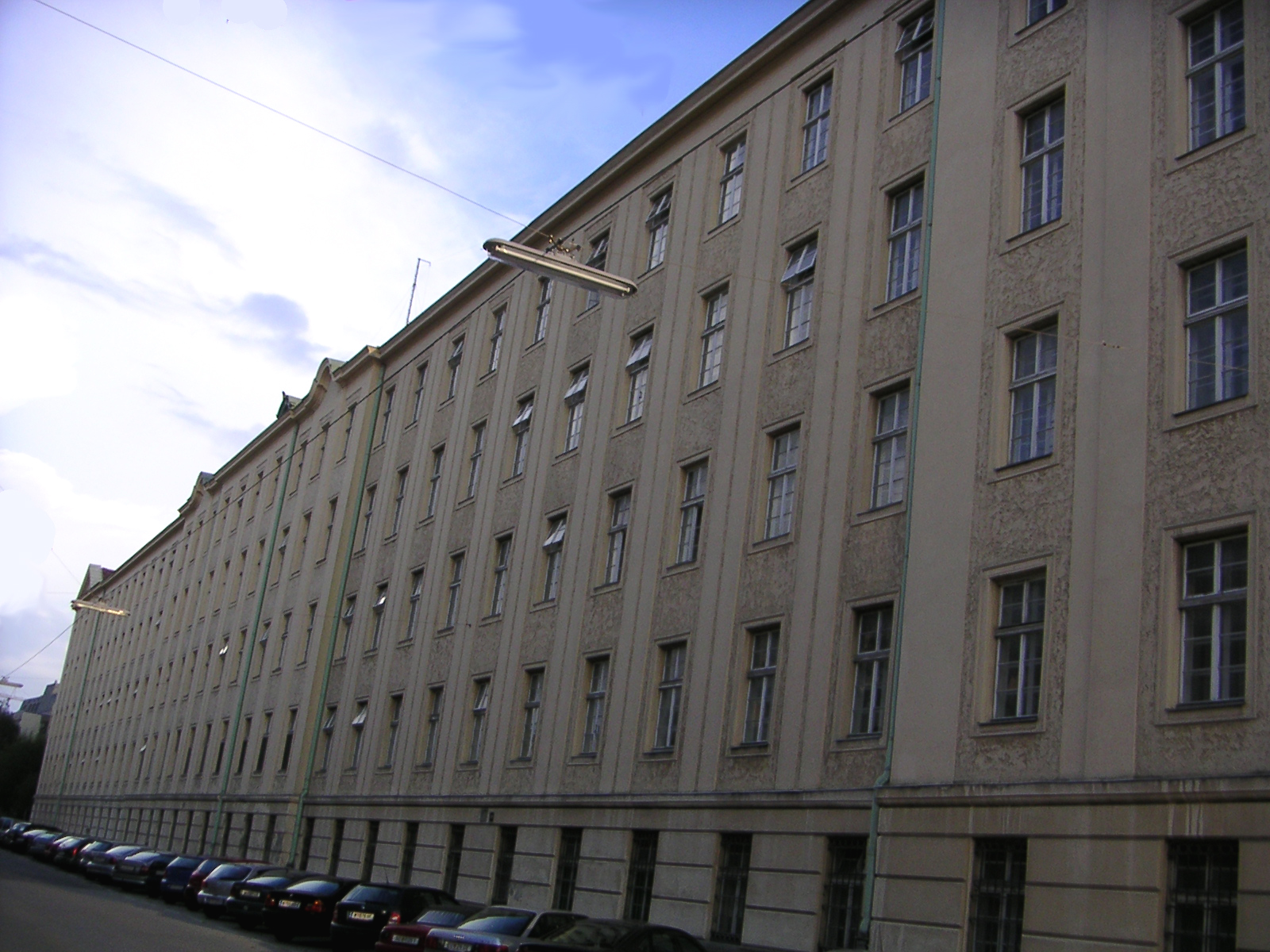 Starhemberg Kaserne (früher Franz-Ferdinand-Kaserne) im 10. Bezirk in Wien, selbst fotografiert, am 23. August, abends